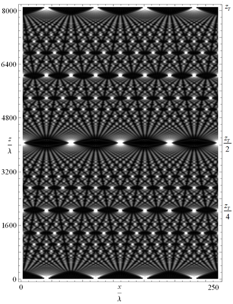 שטיח טלבוט שנוצר מפונקצייה של סריג עקיפה. במרחק טלבוט מקבלים בדיוק את צורת הסריג המקורית, וניתן להבחין גם בשברים של מרחק טלבוט: בחצי מרחק טלבוט נקבל הזזת פאזה של חצי פאי, ברבע מרחק טלבוט נקבל את פונקציית הסריג ללא פאזה, אך מוקטנת פי 2, וכן הלאה.